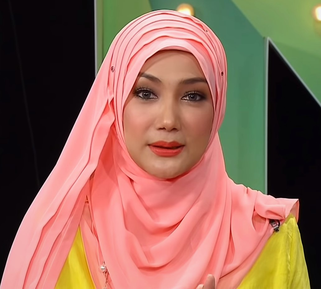 MeleTOP - Pengalaman Baru Setelah Berhijab Erra, Amy & Ziana Ep138 [23.6.2015] Alhamdulillah. Semakin cantik dan hot diva kita Erra Fazira, Amy Mastura & Ziana Zain ni setelah mengenekan penampilan baru. Sejukk je hati memandang. Apa kata kita dengar apa dorang punya cerita. #MeleTOP!